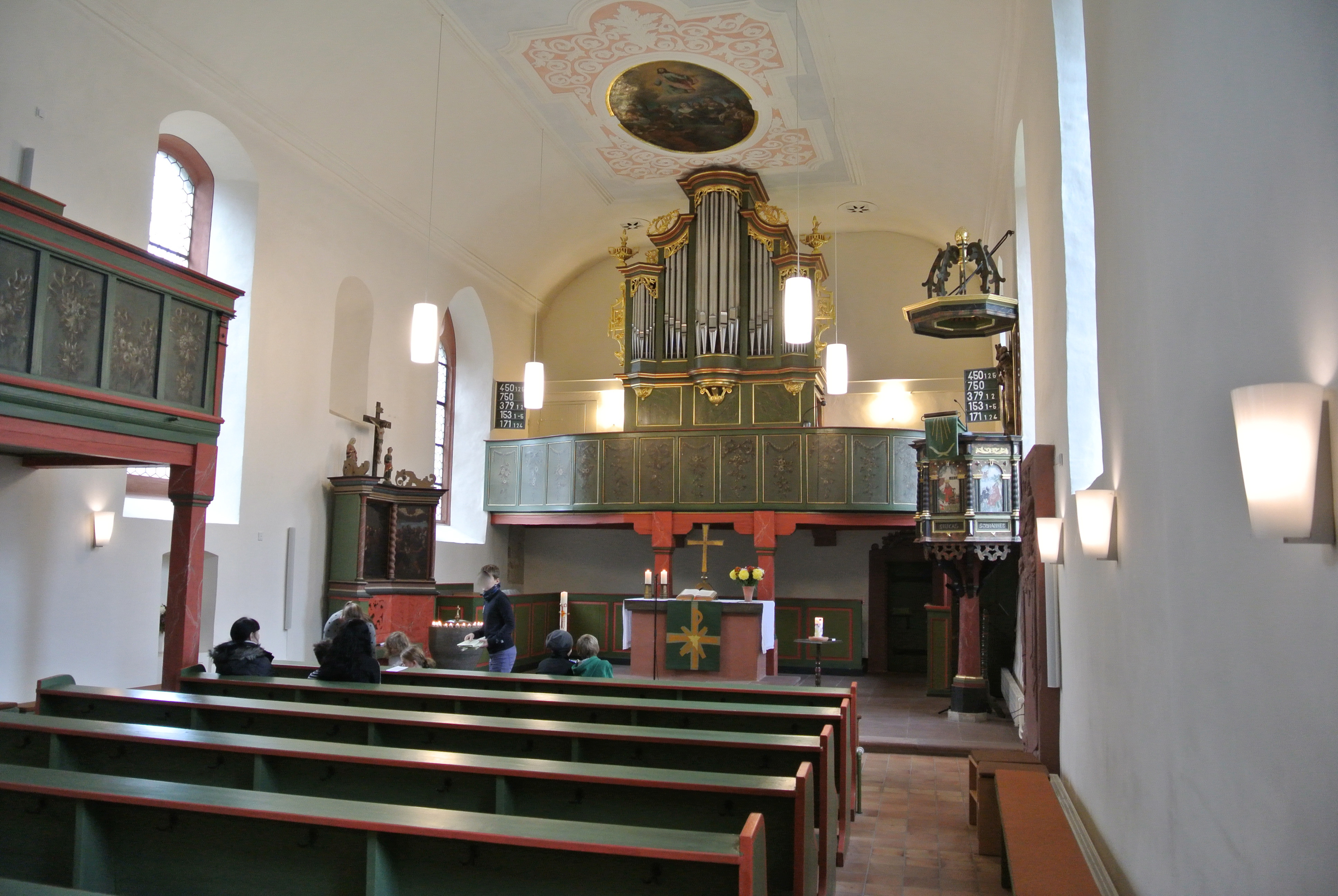 Evangelische Kirche in Frankfurt-Nieder-Erlenbach, Altarraum